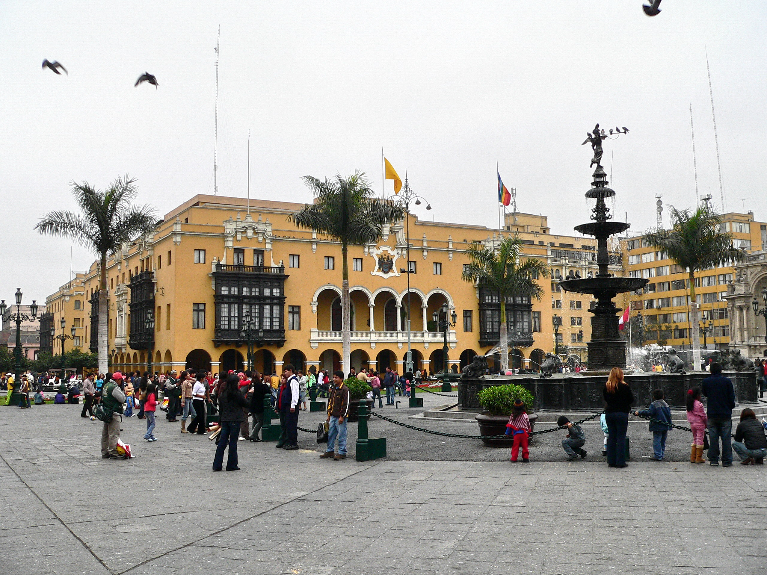 Descripción: Municipalidad Metropolitana de Lima. Lugar: Plaza Mayor — Centro Histórico de Lima Distrito : Cercado de Lima Ciudad : Lima País : Perú Fotógrafo: © Manuel González Olaechea y Franco Fecha de la foto : 8 de julio de 2007